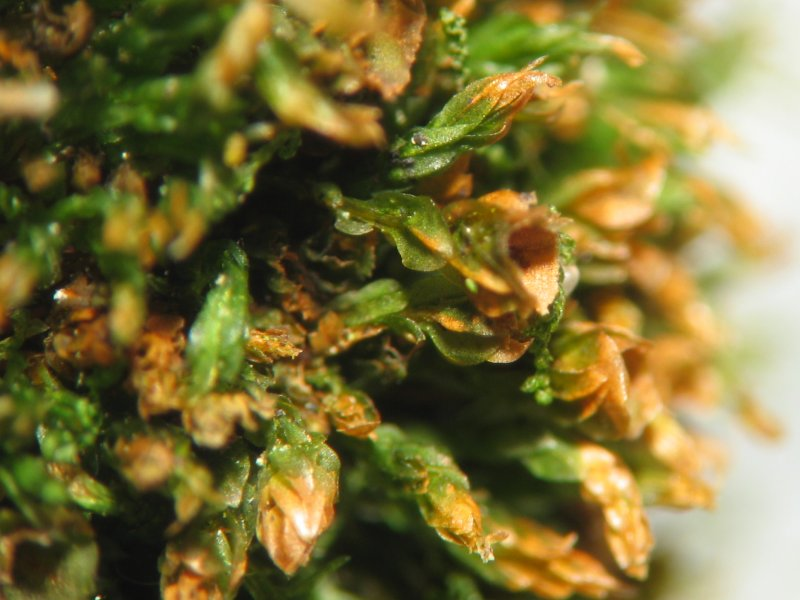 Durchscheinendes Georgsmoos Tetraphis pellucida, Rostock